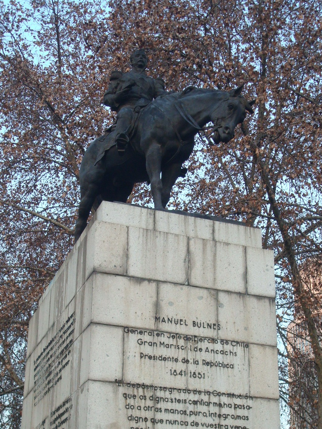 Estatua de Manuel Bulnes, Santiago de Chile